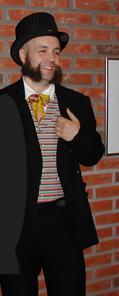 Västerbottensdräkt använd på promovering i Luleå 2010. Hatten hör av förklarliga skäl ej dit. Fotograf Thure Persson, rättigheterna överlåtna 2010.